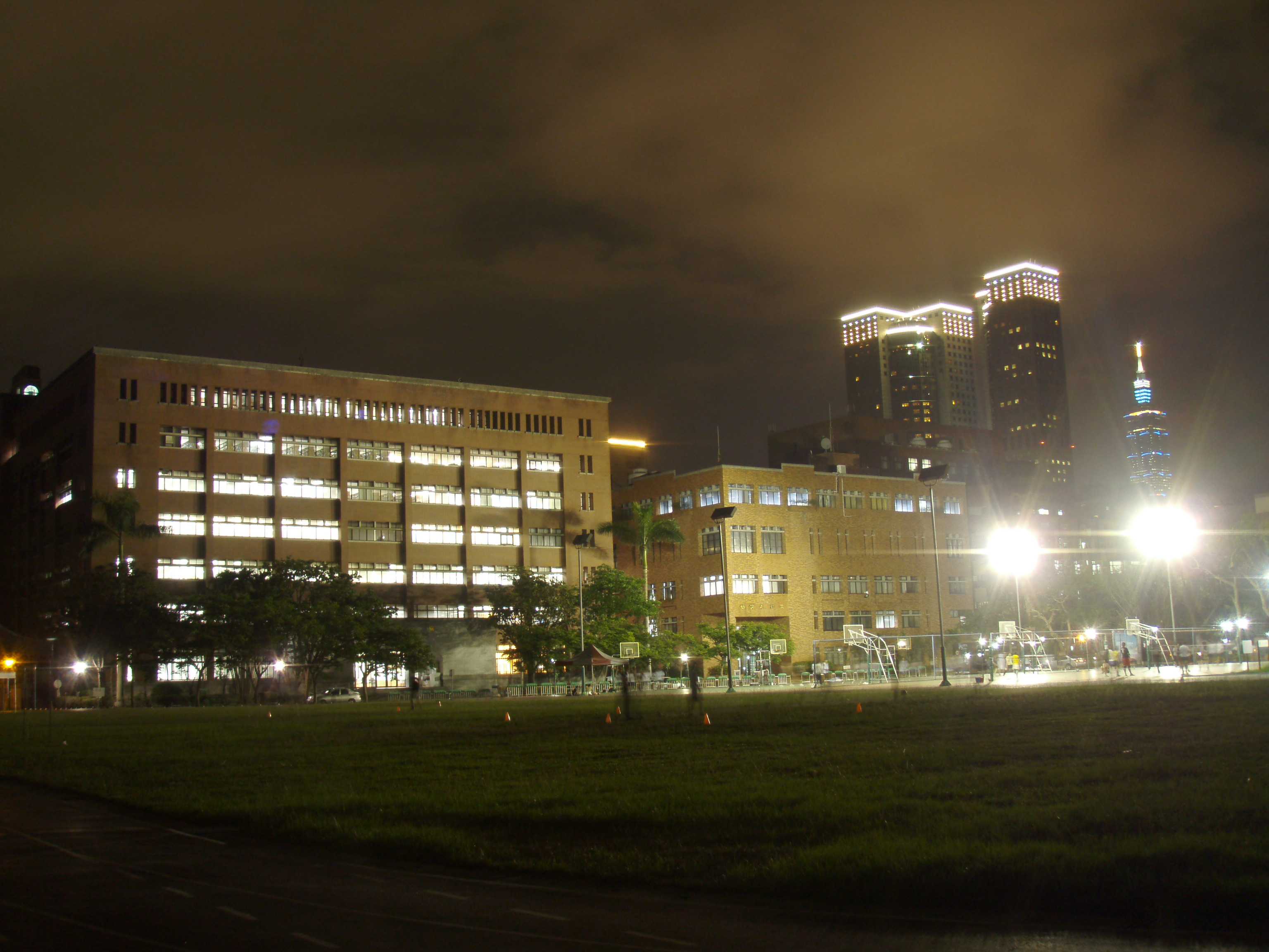 中文（台灣）: 國立臺北教育大學校園夜景，左起圖書館、視聽館及球場。後景為遠企大樓及臺北101